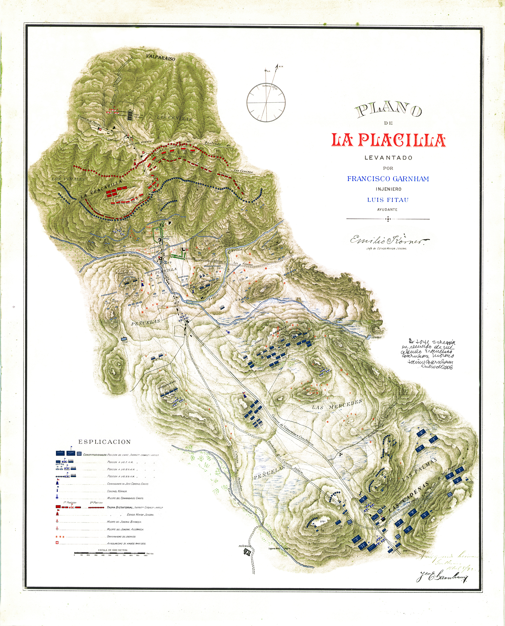 Plano Batalla de Placilla, durante la guerra civil chilena de 1891.